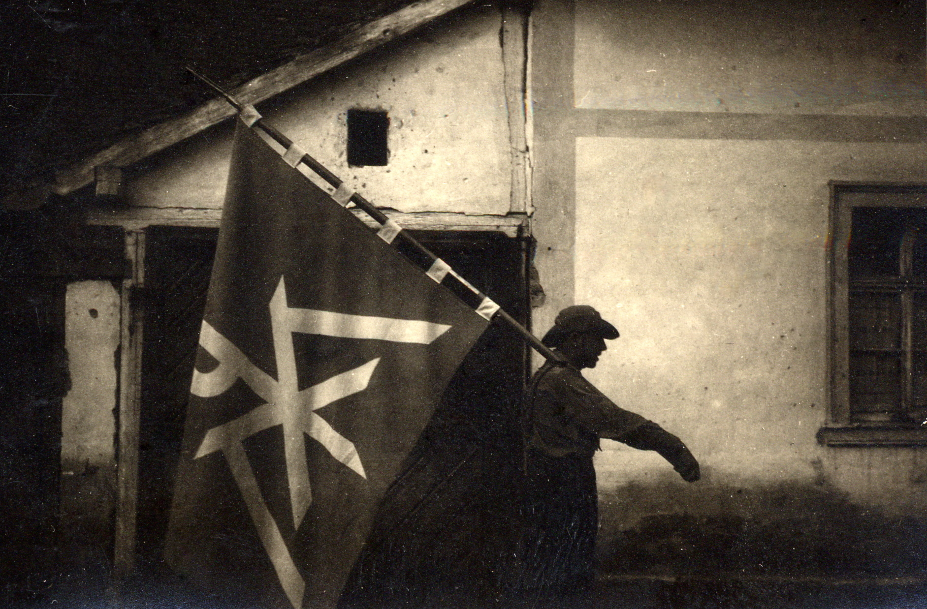 Fahne der Quickborn-Bewegung auf Burg Rothenfels in den zwanziger Jahren des 20. Jahrhunderts, bevor sie von der Gestapo aufgelöst wurde.